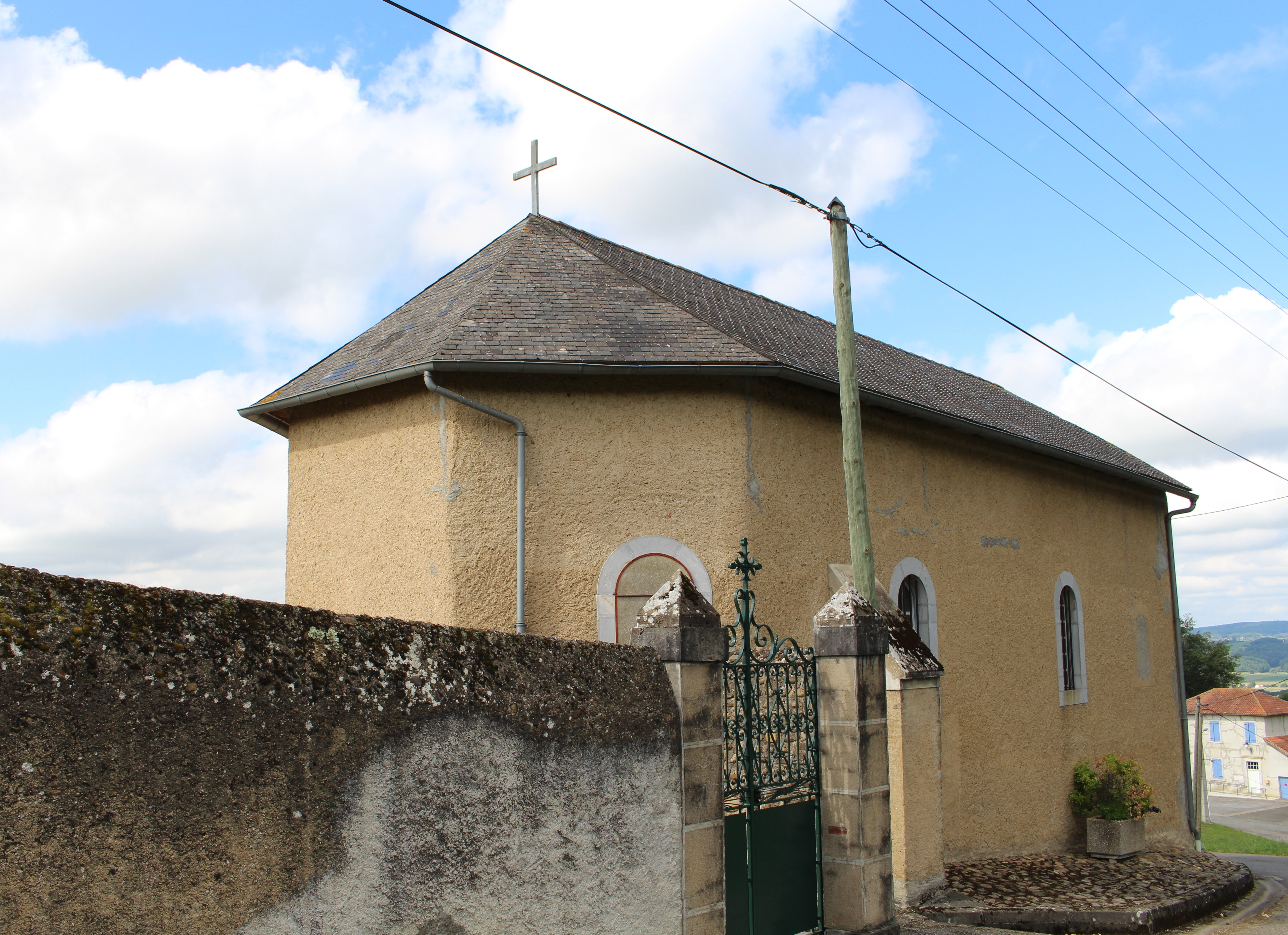 Église Notre-Dame-de-l'Assomption de Peyriguère (Hautes-Pyrénées)